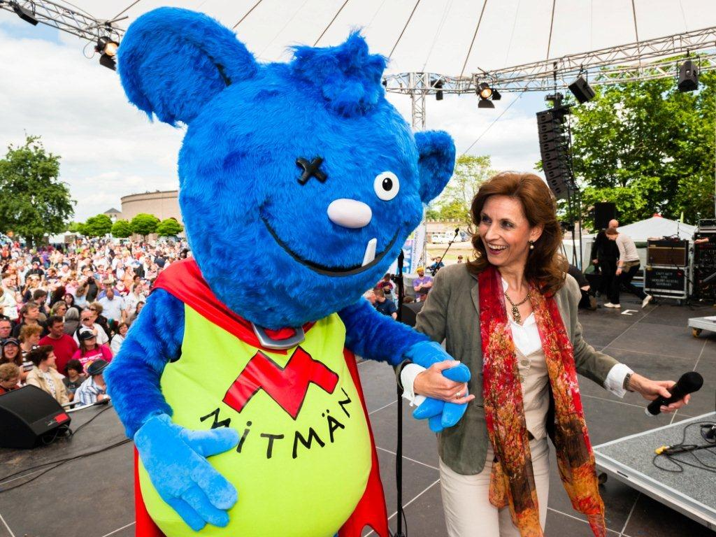 Ulrike Lubek mit dem Maskottchen des LVR beim Tag der Begegnung 2012 in Xanten